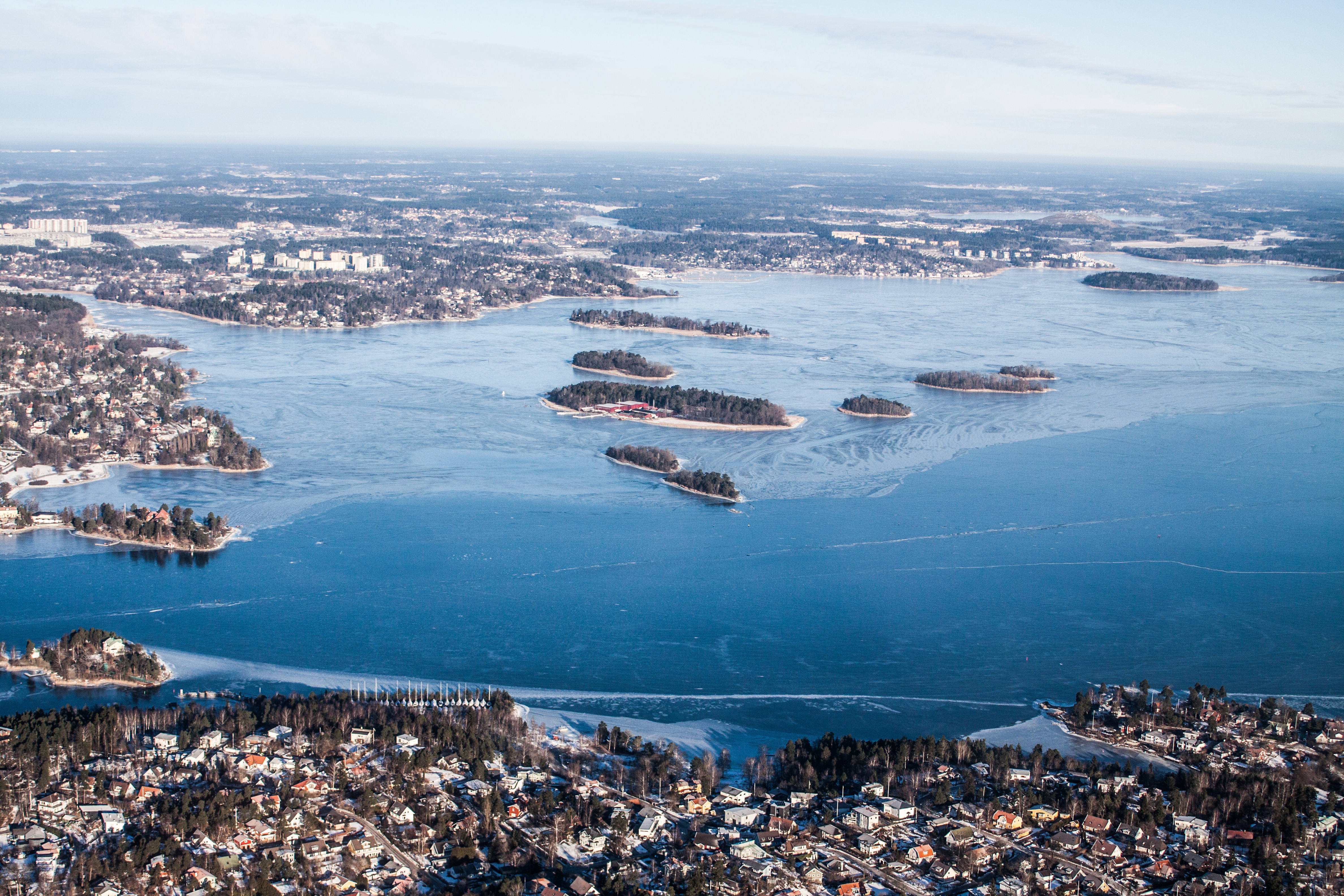 Flygbilder över Stockholms Skärgård arrangerad av Wikimedia